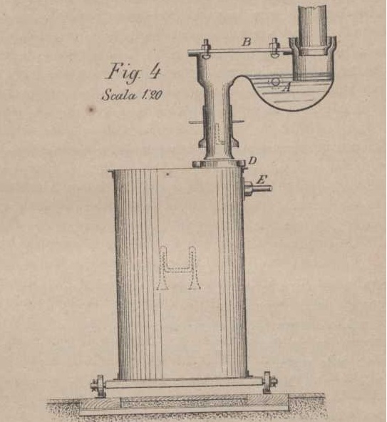 Sifone tratto da Della costruzione dei canali di fognatura e dei diversi mezzi impiegati per tradurre all'esterno le acque lorde e le dejezioni